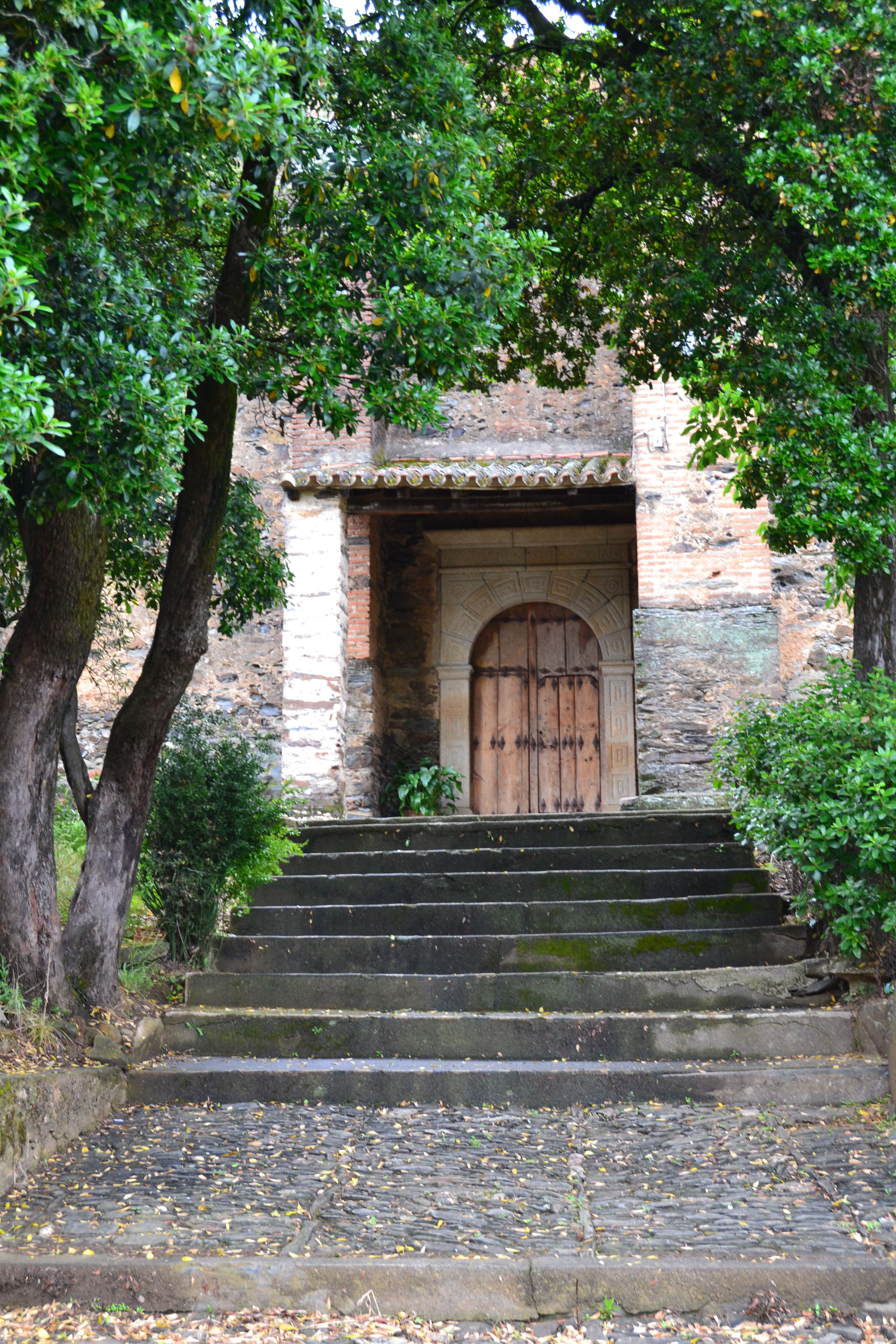 Entrada lateral de la Iglesia de Las Lástimas, vista desde la plaza. Es la puerta que se usa habitualmente.